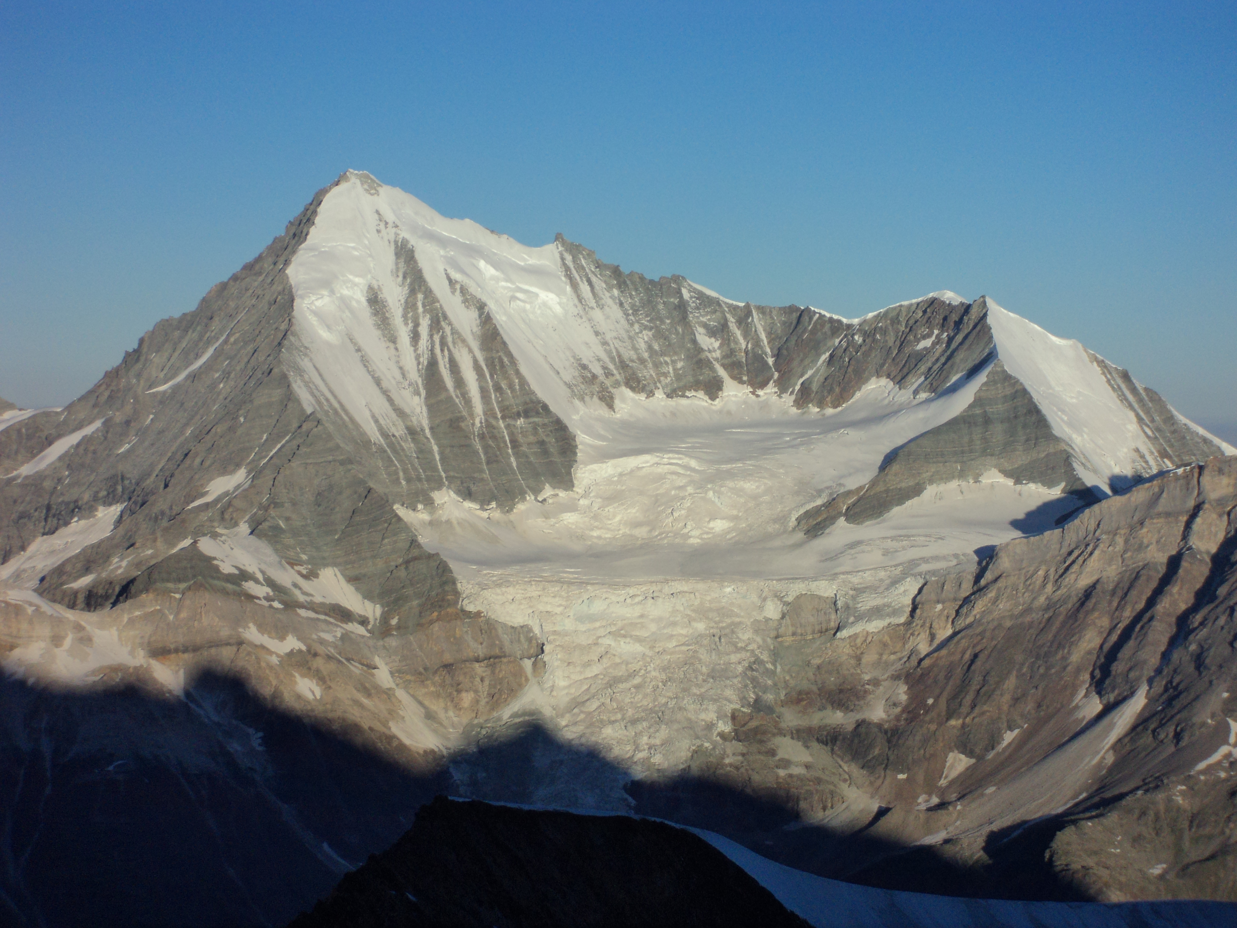 Versante est della montagna ripreso lungo la via normale al Dom del Mischabel